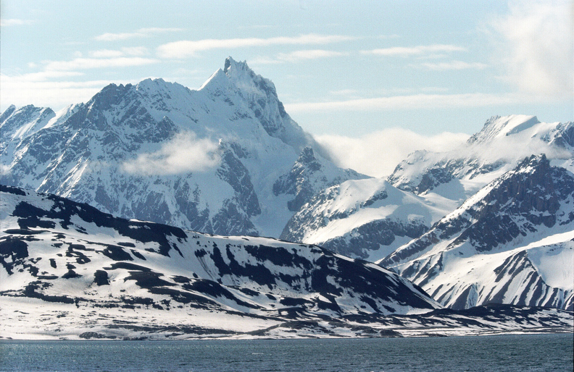 Svalbard, Hornsund, Hornsundtind